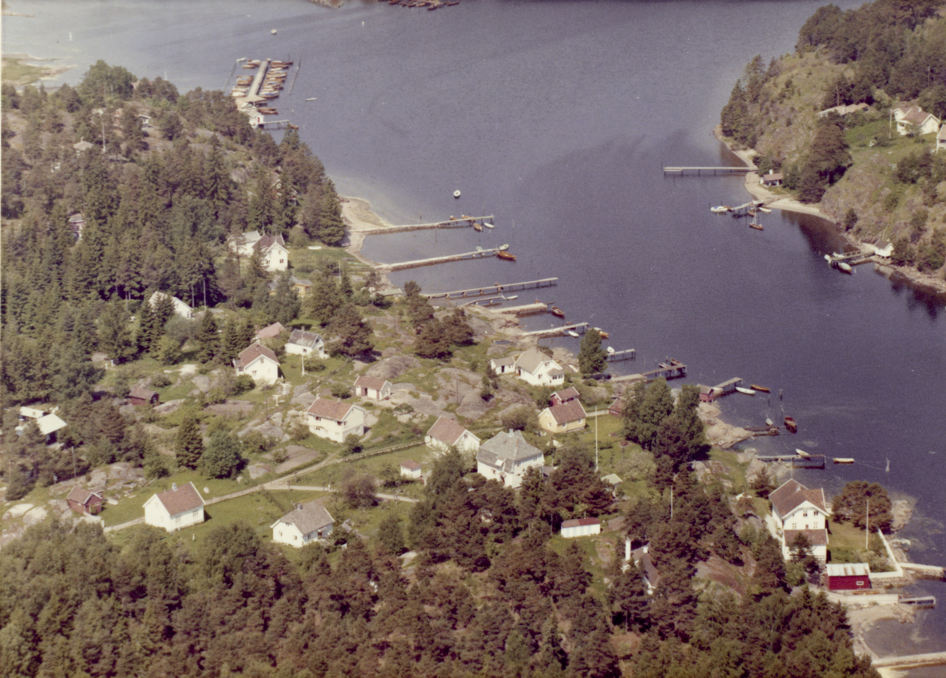 WF.S.164555